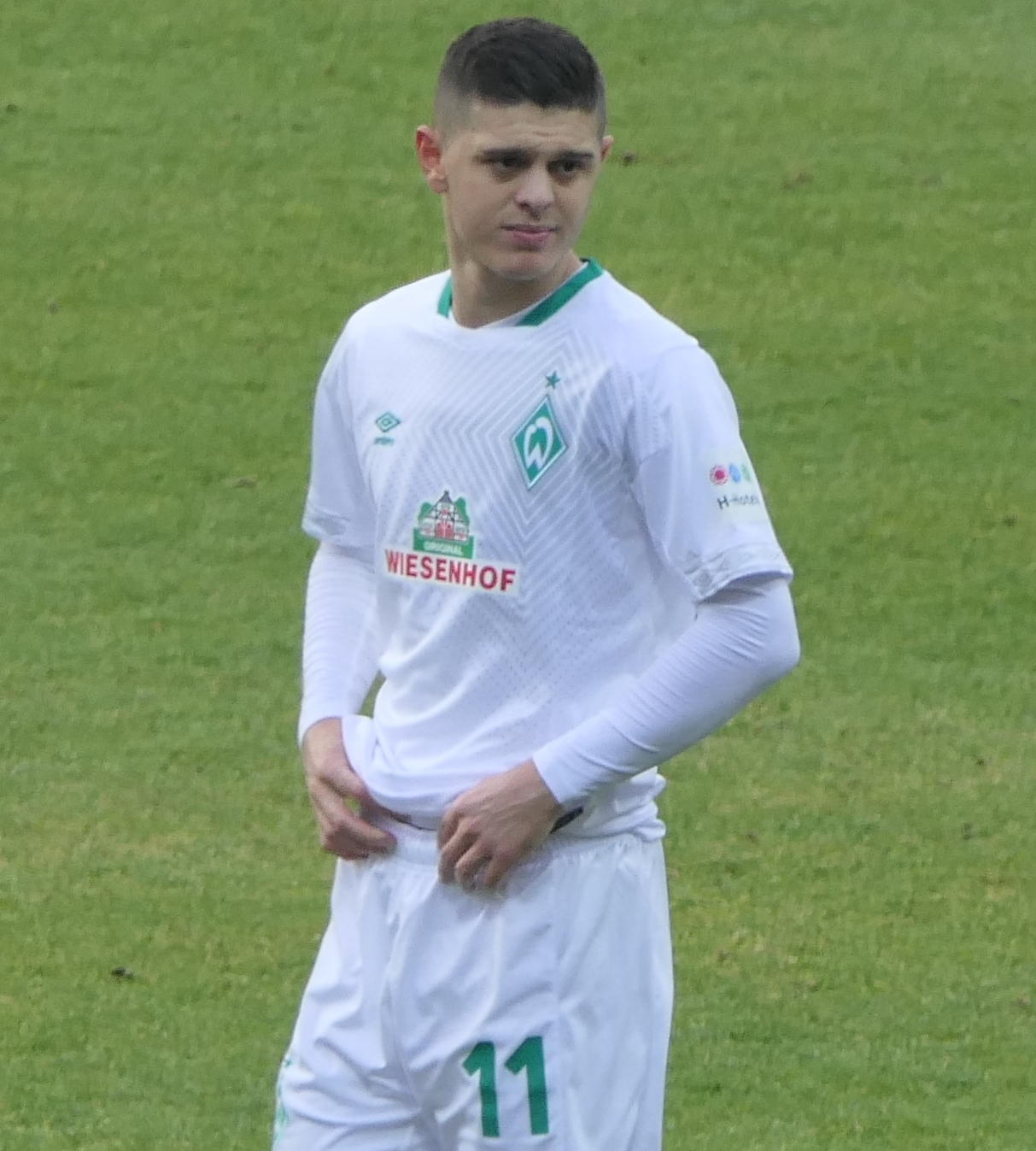 Der Fussballprofi Milot Rashica im Trikot vom SV Werder Bremen beim Auswärtsspiel gegen den 1.FC Nürnberg am 02.02.2019.